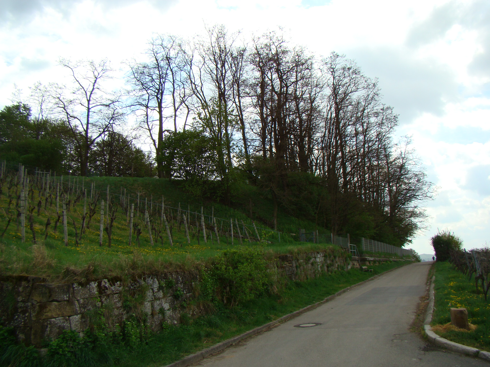 Wasserhochbehälter am Wartberg in Heilbronn